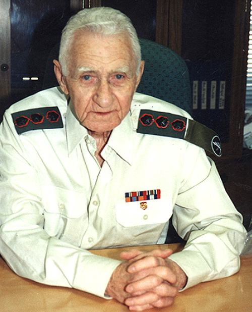 Depicted person: Izhak Graziani – Israeli musician